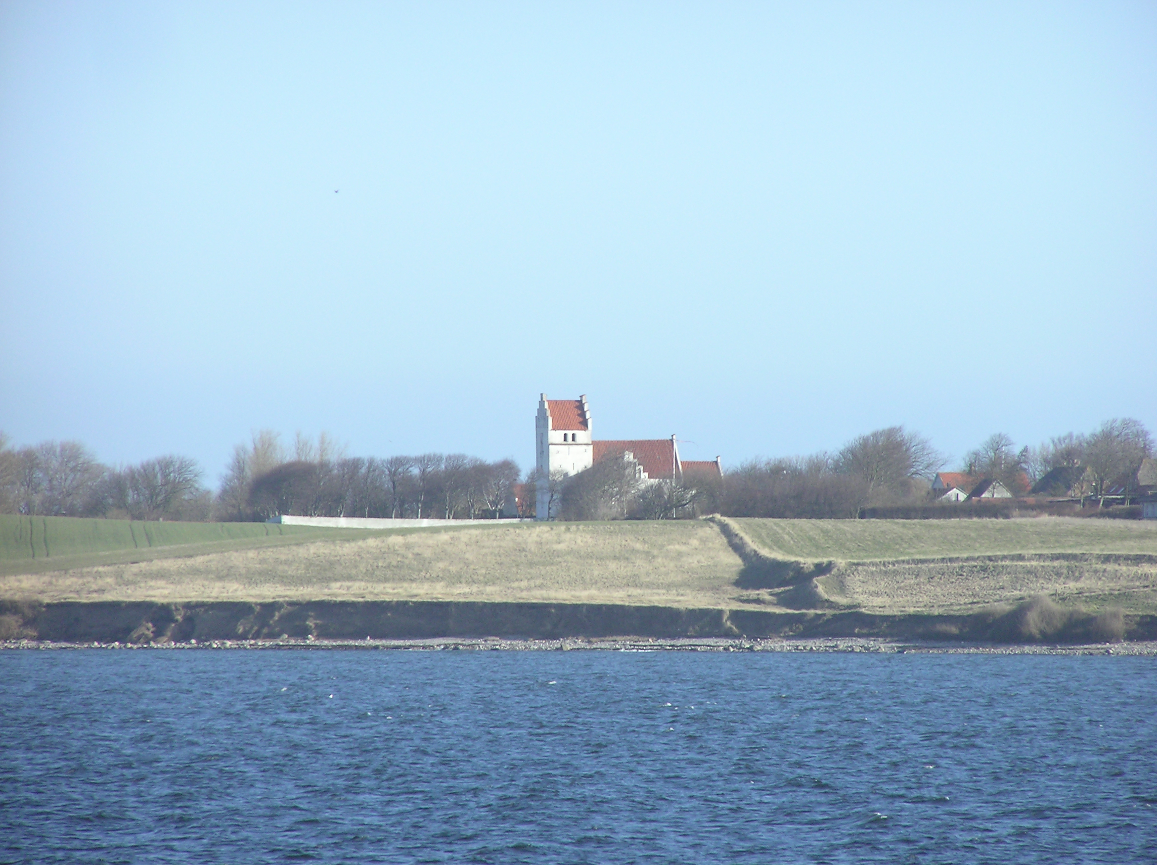 Danmark Sjælland Seierø Kirche